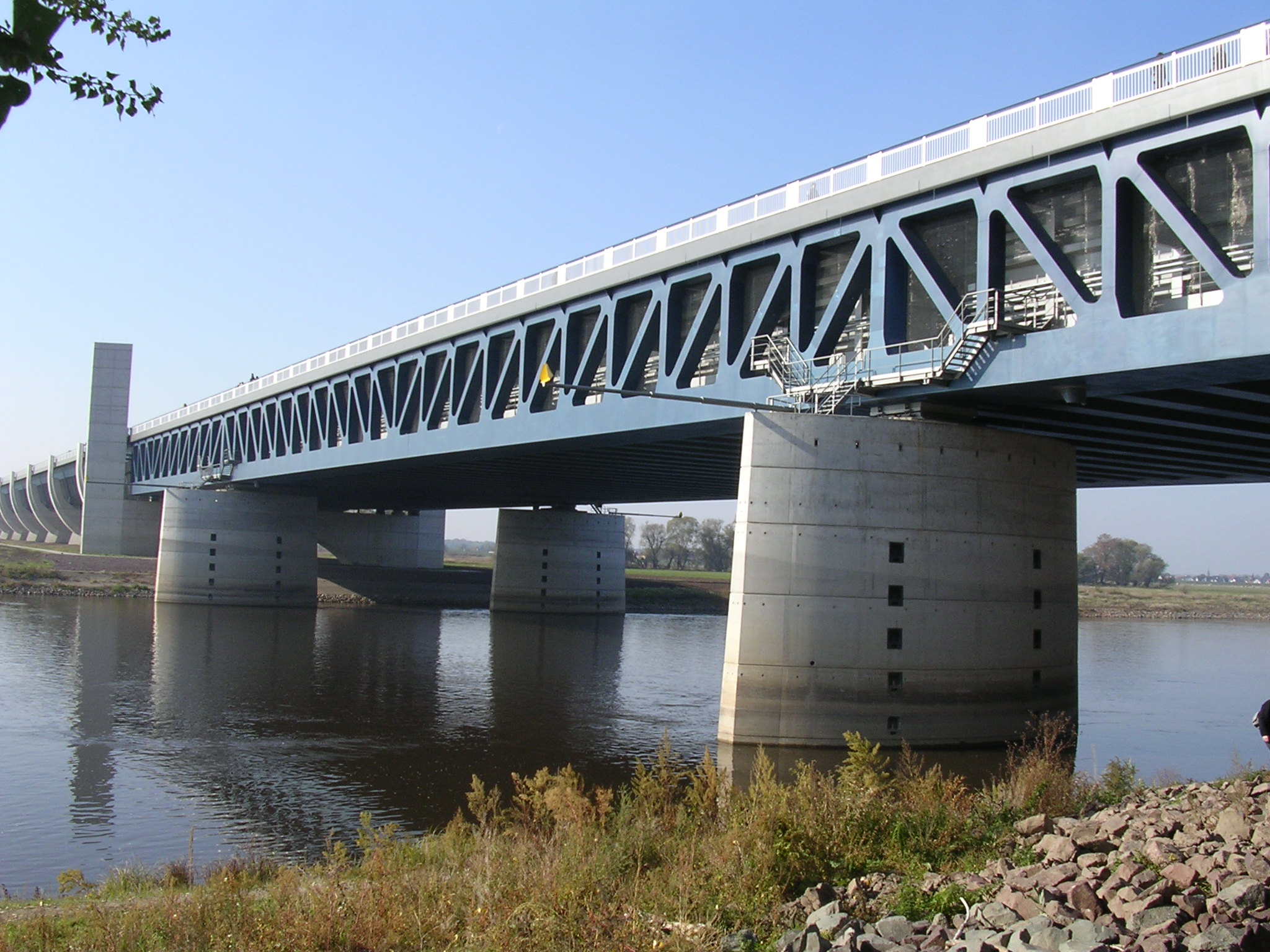 Das Wasserstraßenkreuz bei Magdeburg. Der Mittellandkanal wird in der Trogbrücke über die Elbe geführt.